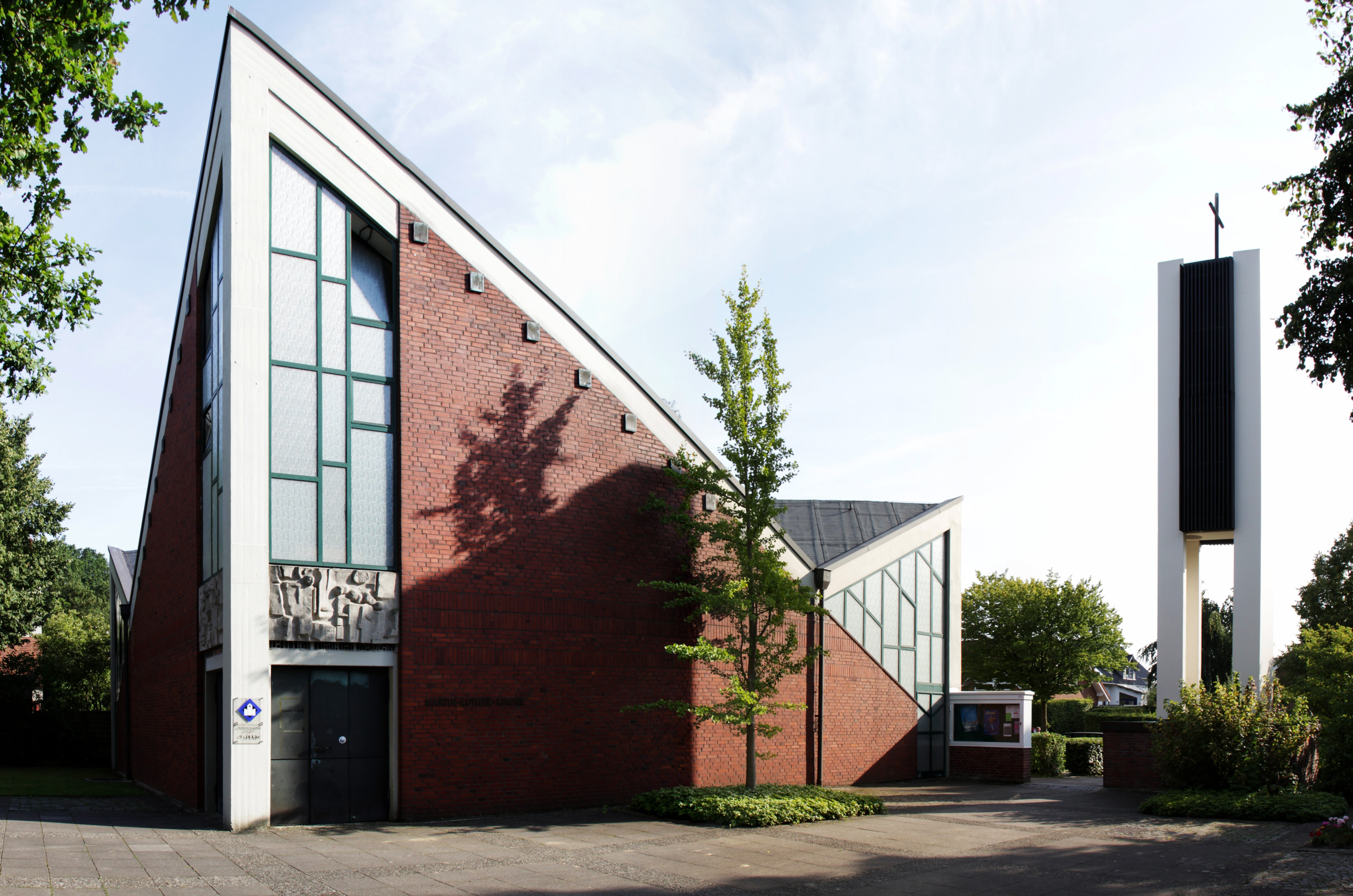 Martin Luther Kirche in Münster / Westfalen, Stadtteil Mecklenbeck